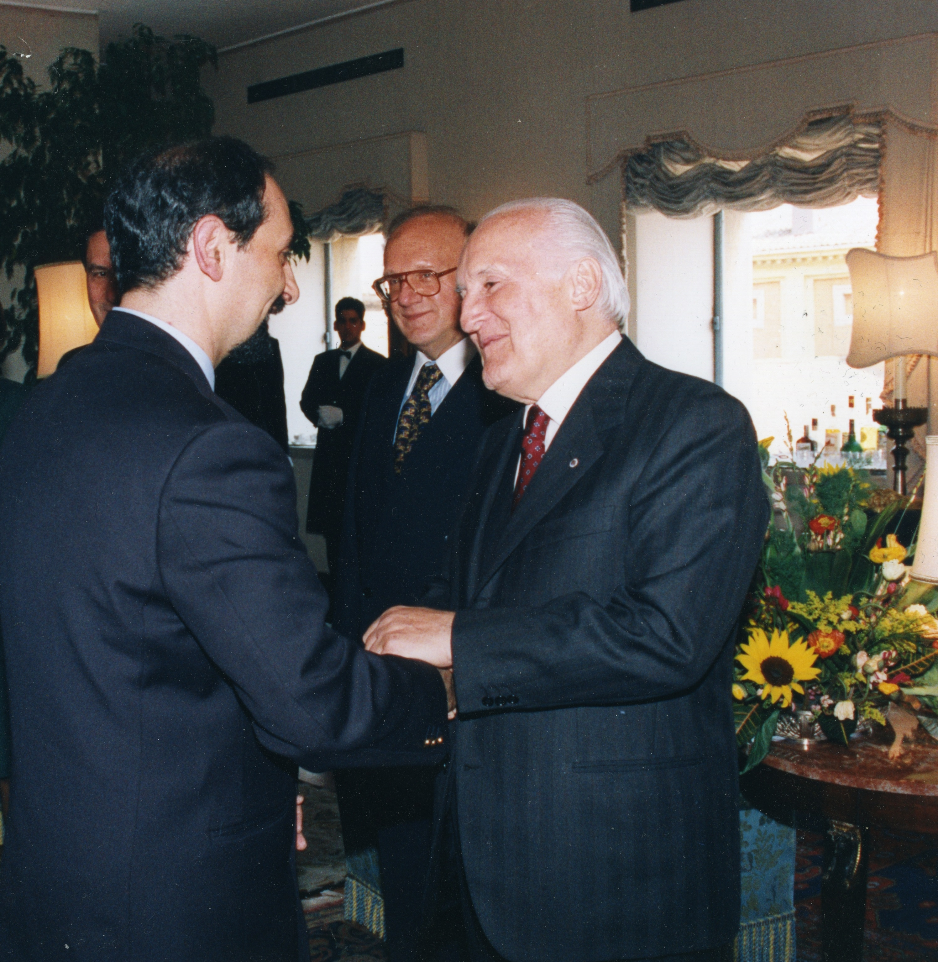 Umberto Guidoni riceve onorificienza dal Pres. Oscar Luigi Scalfaro (1996)